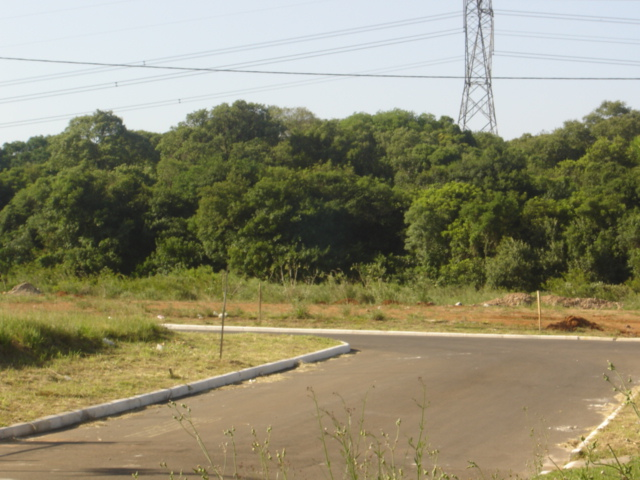 Descrição Vegetação de Canoas.